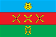 Прапор Чечельницького району